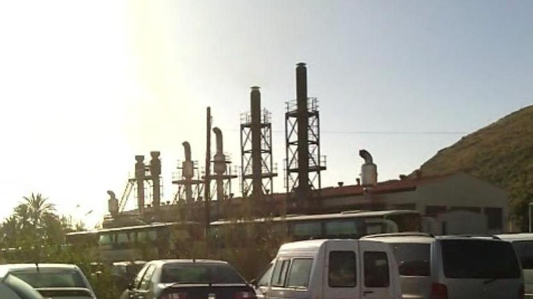 La Gomera Oil Power Electric Station